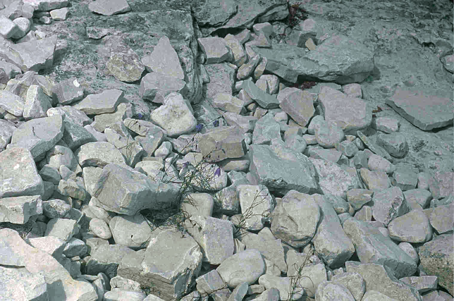 Canchal en rocas calizas producido por gelifracción en una playa de Flowerpot Island, en Ontario, Canadá